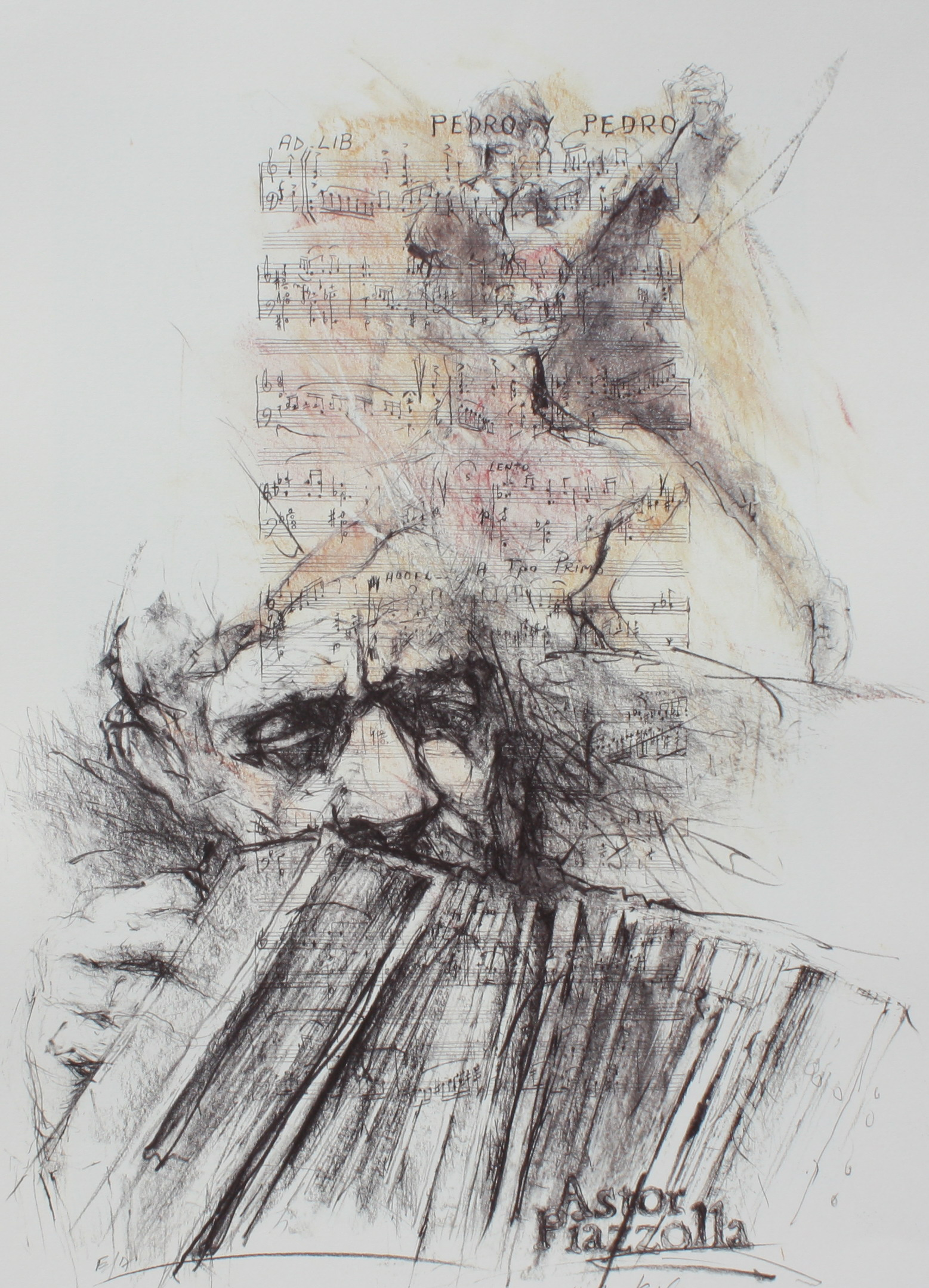 Hetty Krist, Astor Piazolla (Farblithographie)